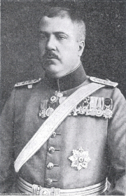 Ludwig Bassermann-Jordan, Winzer und Bürgermeister von Deidesheim